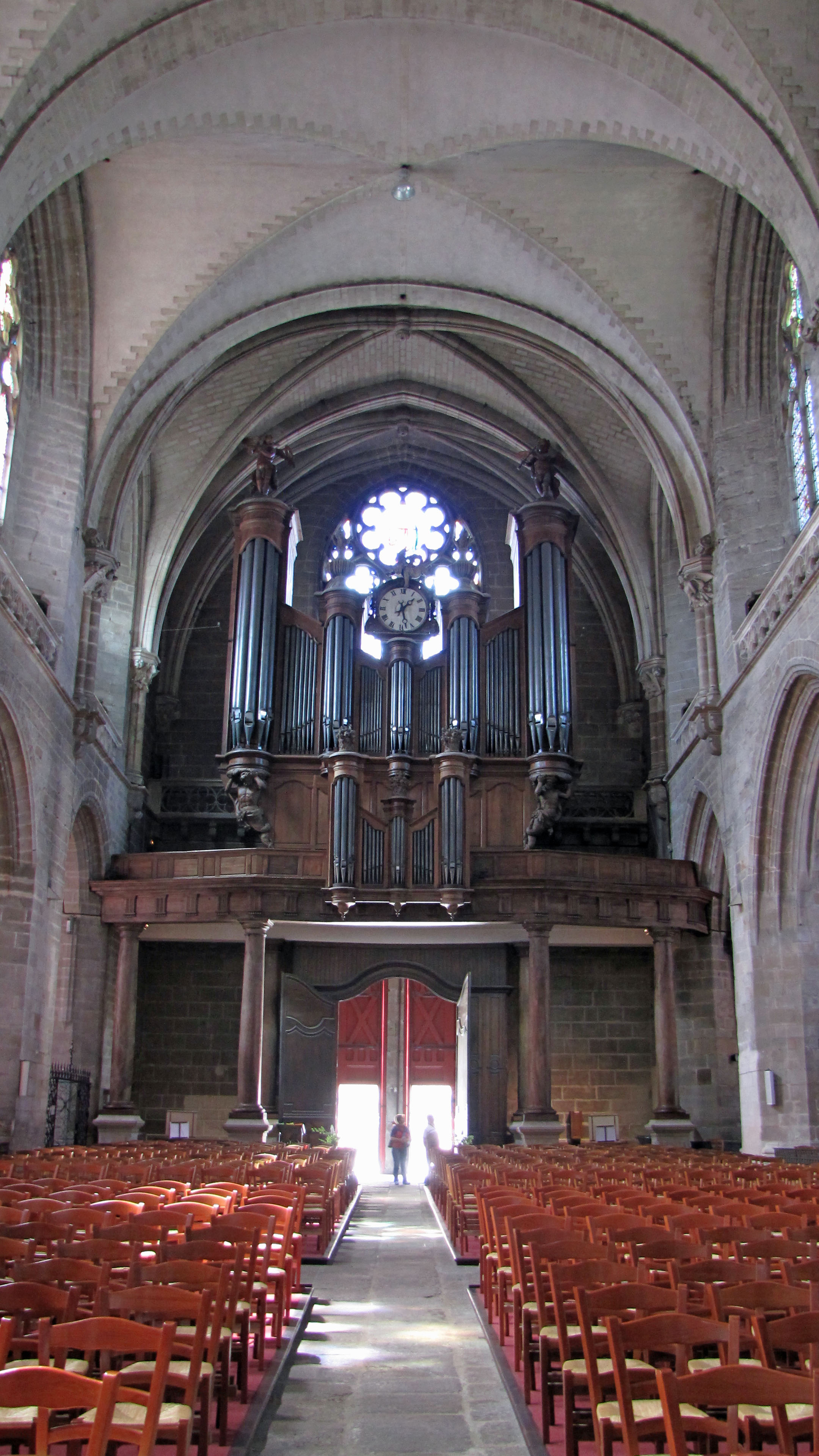 Cathédrale Saint-Pierre de Vannes